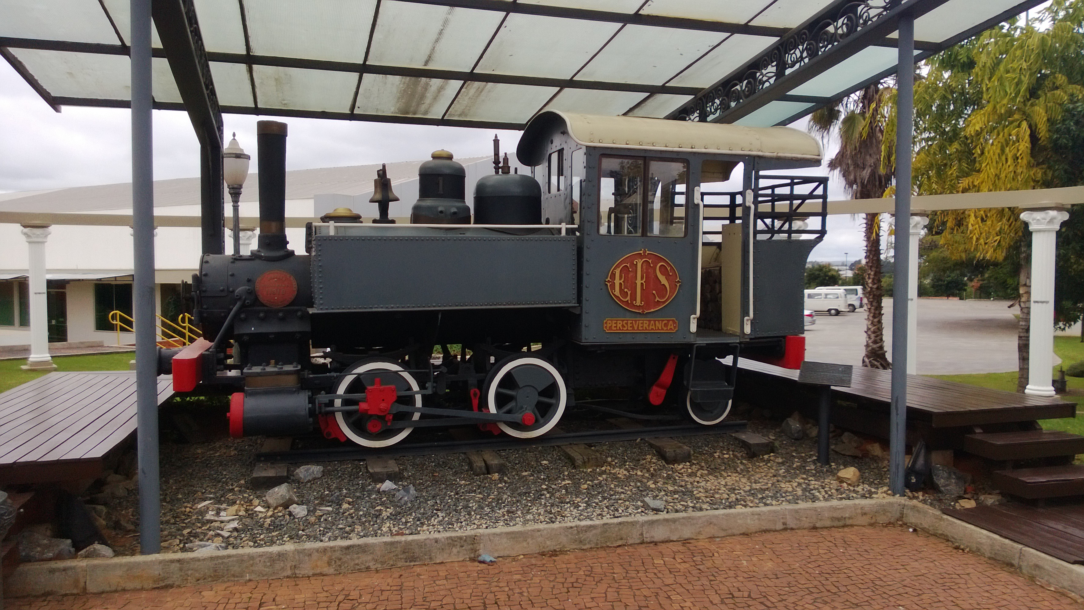 Locomotiva da Estrada de Ferro Sorocabana exposta na sede do Jornal Cruzeiro do Sul em Sorocaba. Esta locomotiva percorreu o trecho Sorocaba-Votorantim-Santa Helena a partir de 23 de março de 1893 transportando cargas e passageiros até a inauguração da estrada de ferro elétrica, ocorrida em 4 de fevereiro de 1922. Fabricada pela Baldwin Locomotive Works de Philadelfia (EE.UU.) em abril de 1891. Representa uma homenagem ao maçom Luiz Matheus Maylasky, um dos fundadores da saudosa Estrada de Ferro Sorocabana, nascida na Loja Maçonica Perseverança III. (texto na placa informativa em frente à locomotiva).